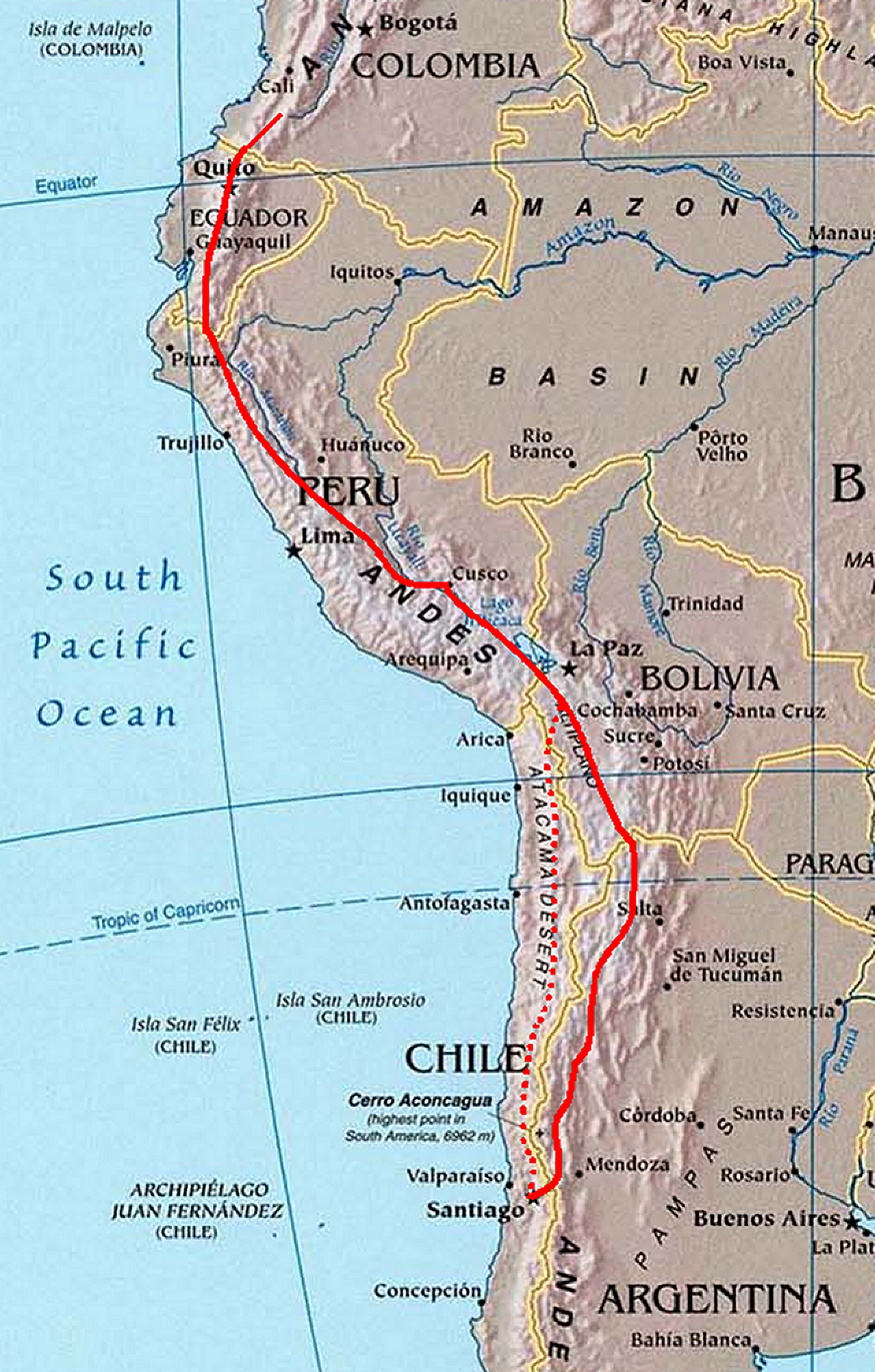 Carte du Qhapaq Ñan/ Grande Route Inca Carte générale de La Grande Route Inca, l'axe principal nord-sud de l'Empire Inca, long de plus de 6000km. Il traverse 6 pays: la Colombie, l'Equateur, le Pérou, la Bolivie, le Chili et l'Argentine. 28 septembre 2007 - Laurent Granier/ Megan Son